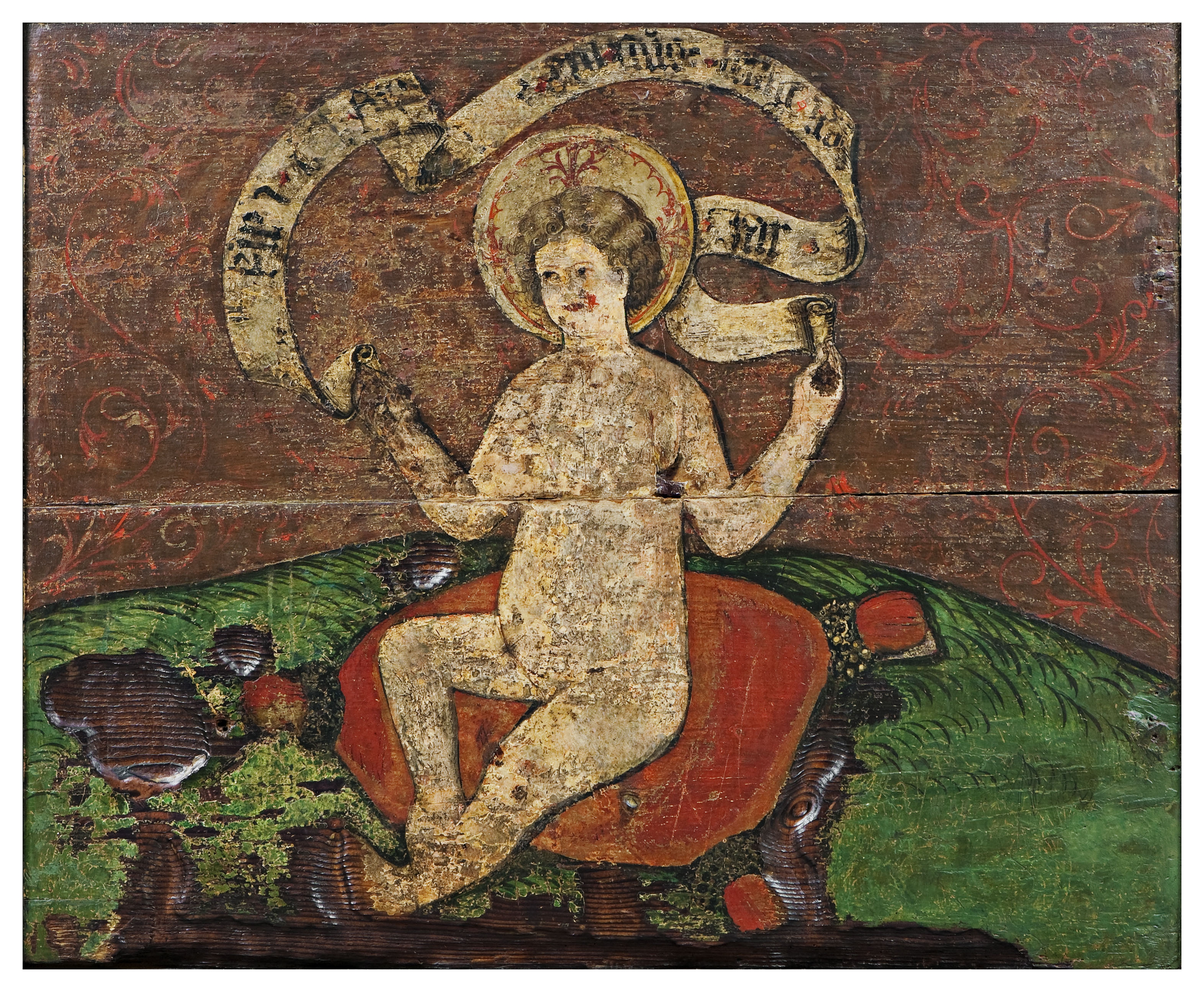 Holzbild des Jesuskindes in der Kreuzgangkapelle des Klosters Wettingen